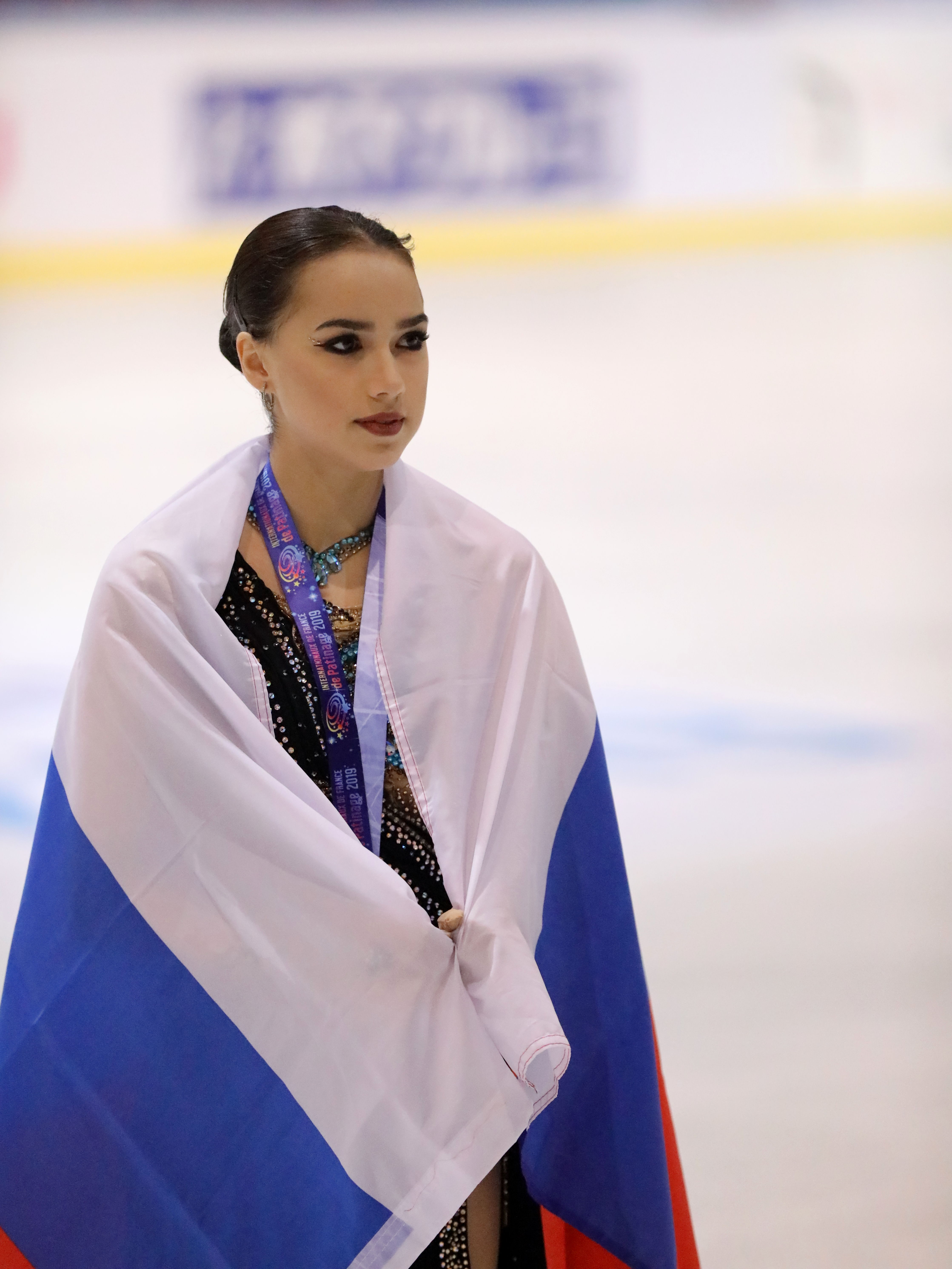 Internationaux de France 2019